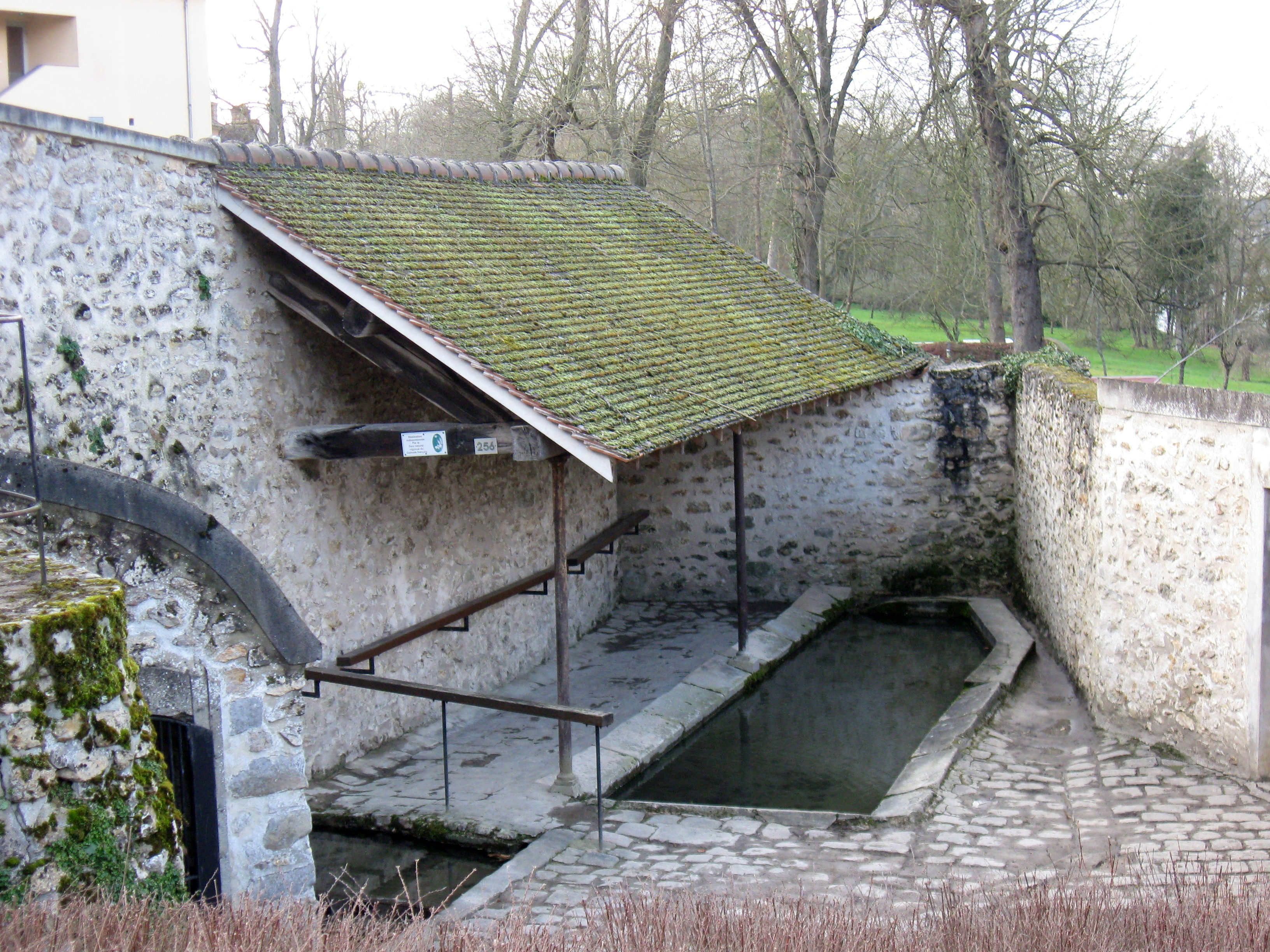 Lavoir à Vosves, commune de Dammarie-les-Lys. (Seine-et-Marne, région Île-de-France).